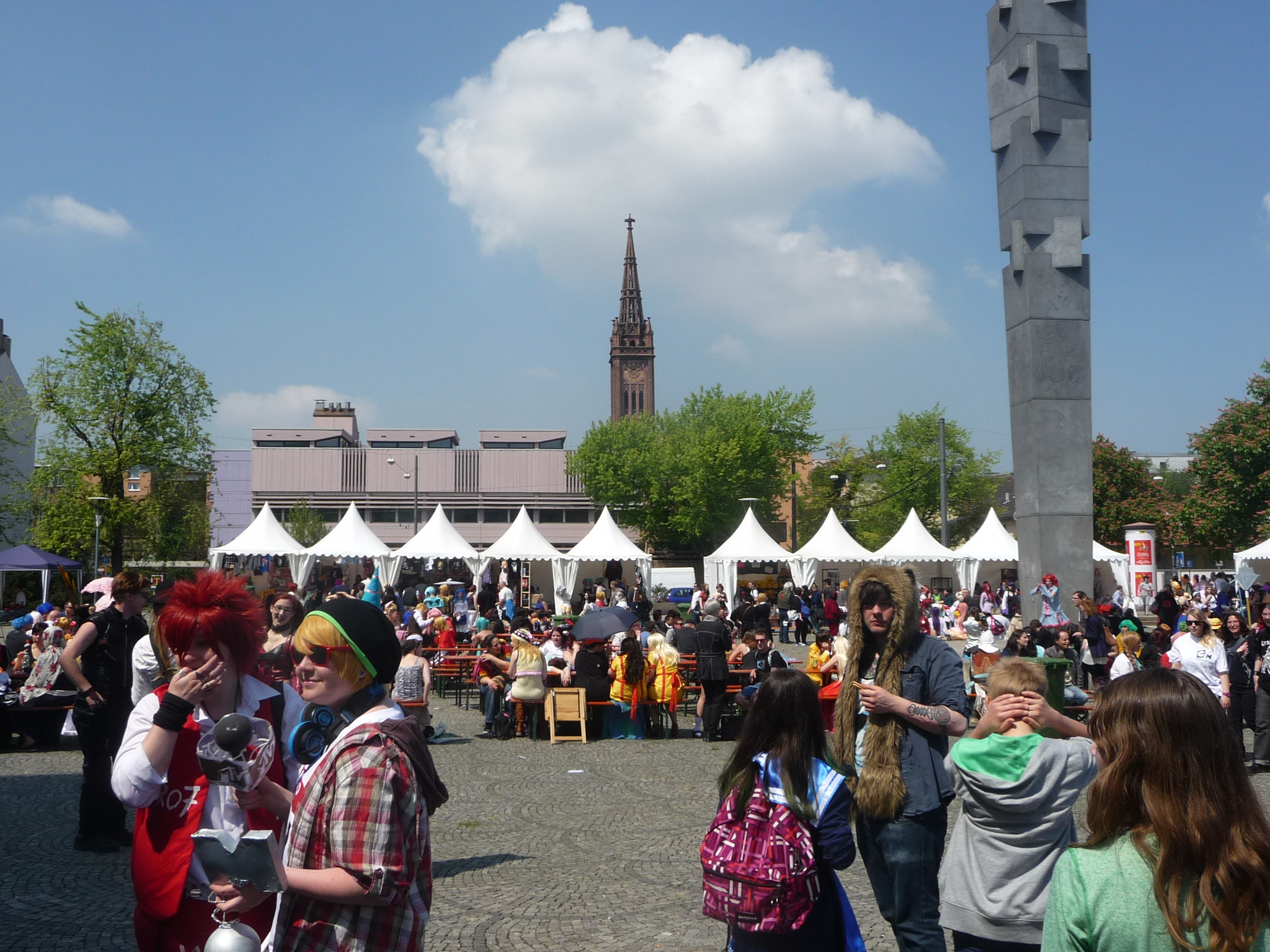 Die Hanami (von jap. 花見 ‚Blüten betrachten‘) ist eine jährlich stattfindende, zweitägige Anime-Convention (Veranstaltung für Manga- und Anime-Fans), welche vom Animexx e.V. veranstaltet wird.